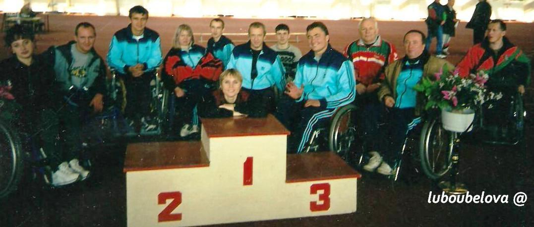 Liubou Bialova Head coach Paralympic Team.